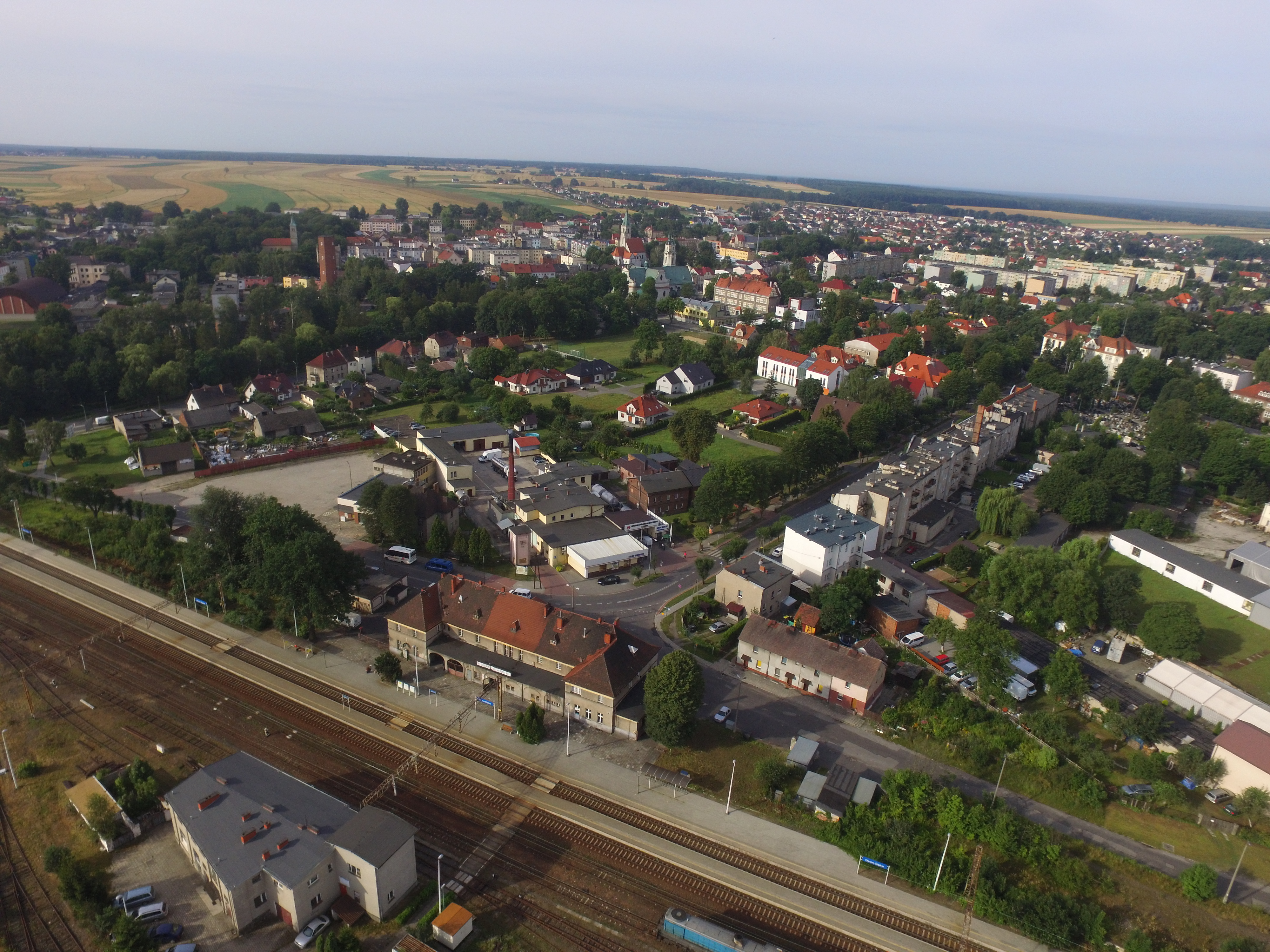 Stacja kolejowa Olesno Śląskie, widoczny budynek dworca kolejowego, w tle panorama miasta